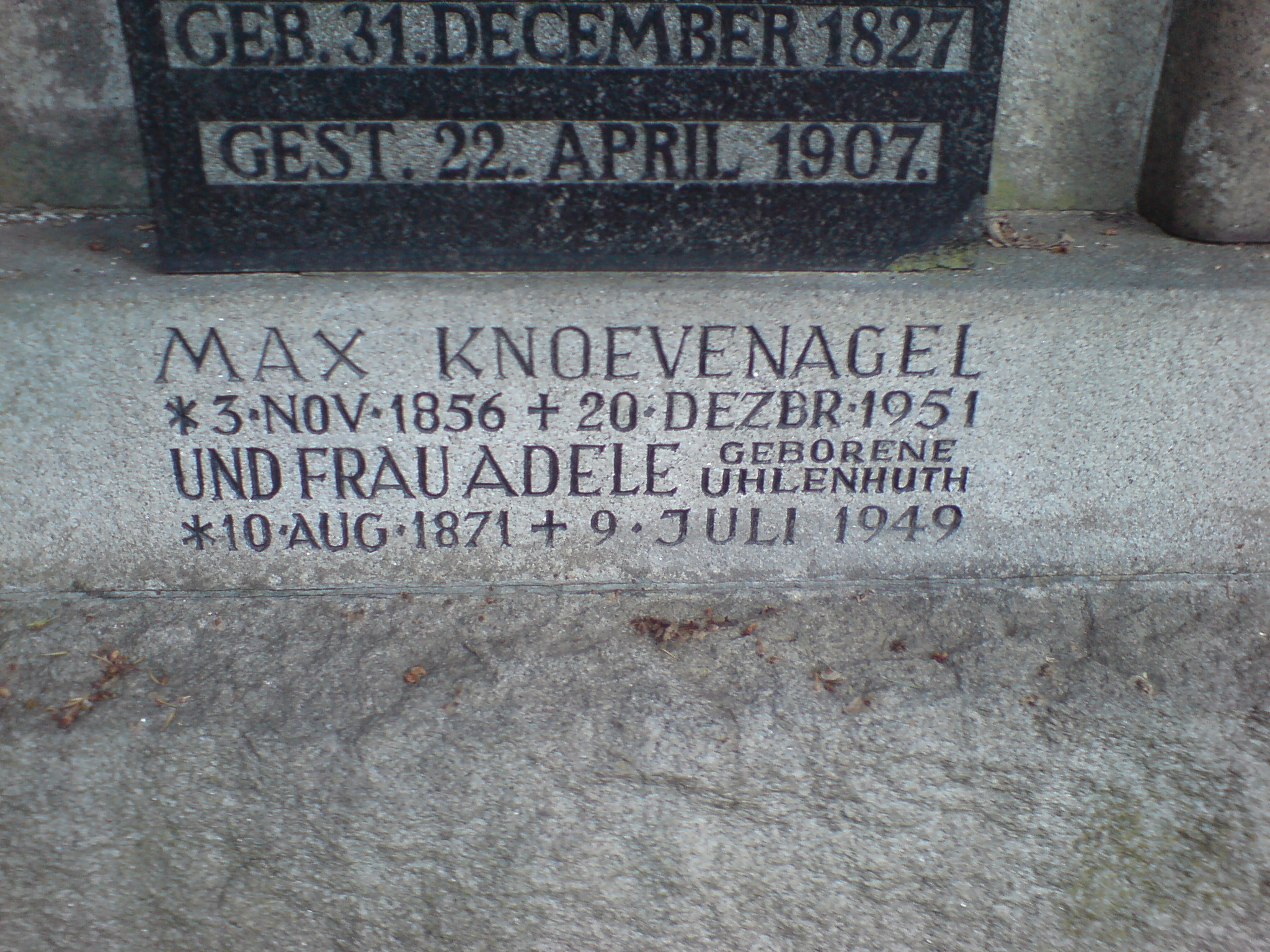 Grabinschriften auf dem Familiengrab von Albert Knoevenagel